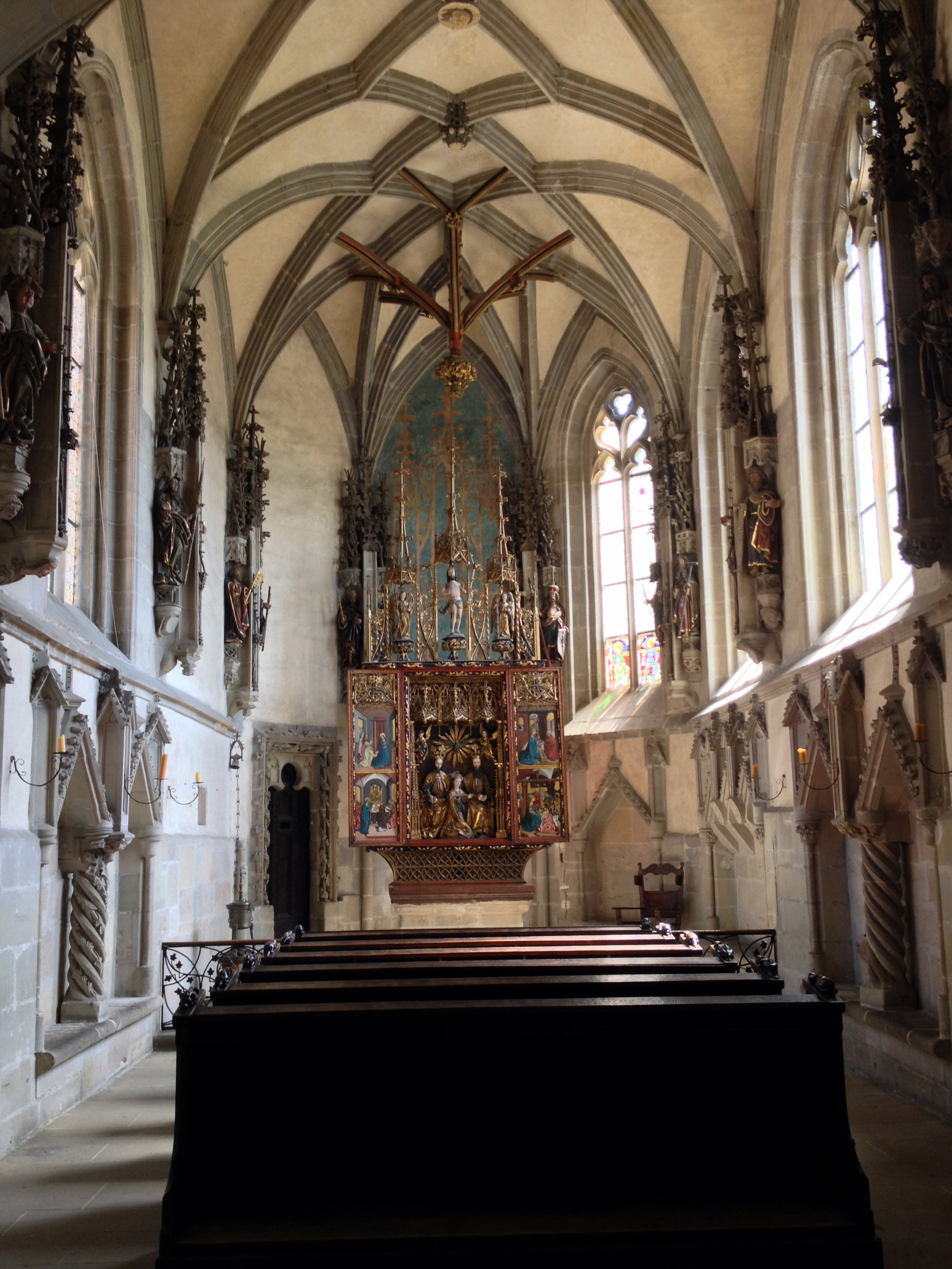 interiér kaple Korunování Panny Marie